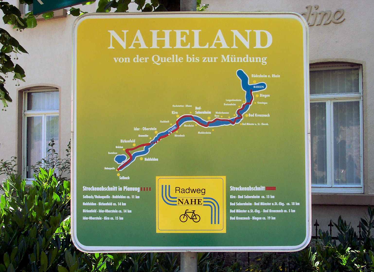 Schild des Nahe-Radwegs.